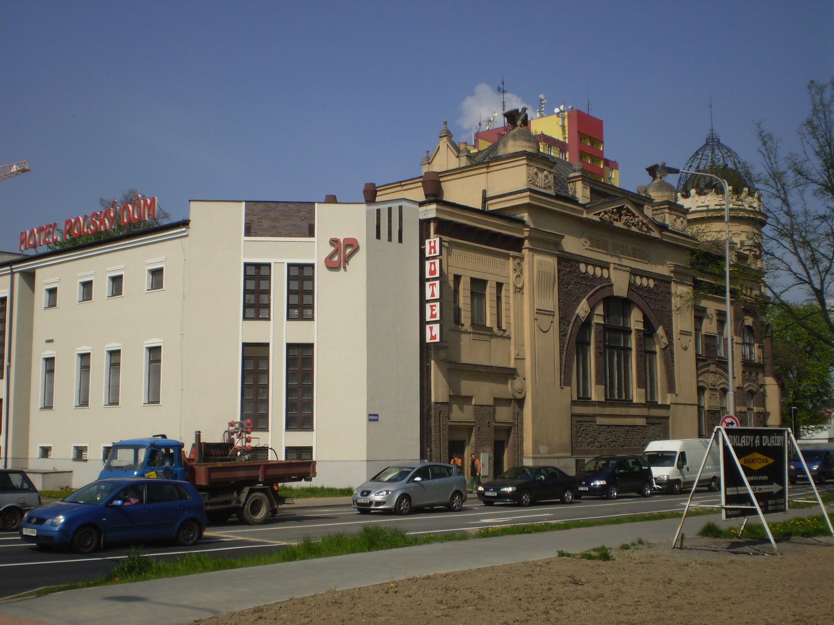 Polský dům v Ostravě.